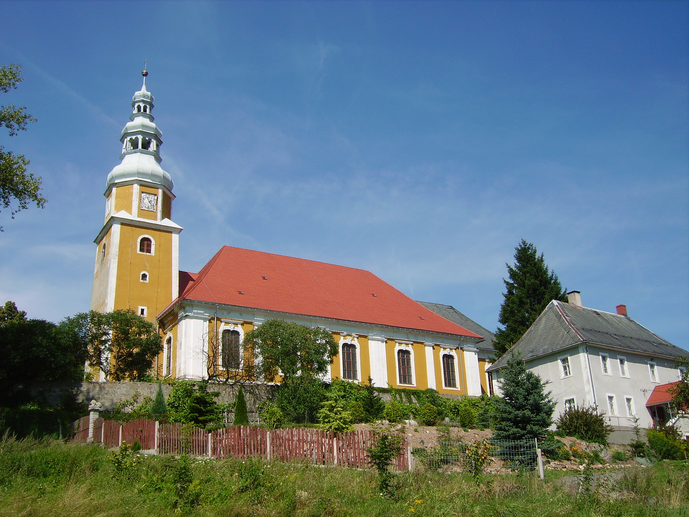 Pławna Dolna kościół św. Tekli, z 1680 r.